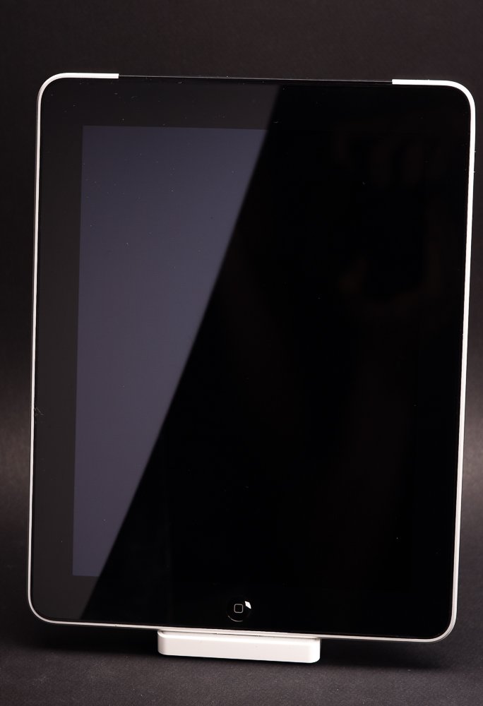 iPad первого поколения на подставке iDock